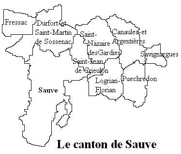 le canton de Sauve Image personnelle